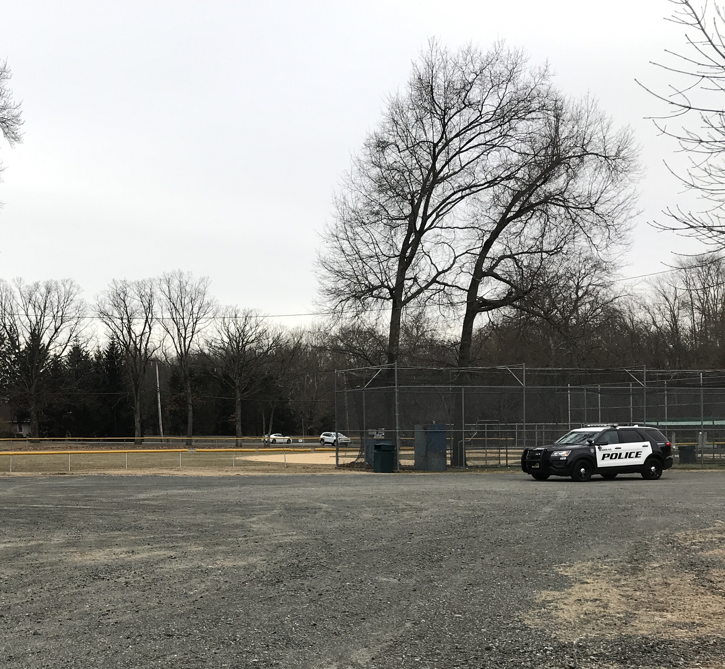 Sam Braen Field, Mahwah, New Jersey